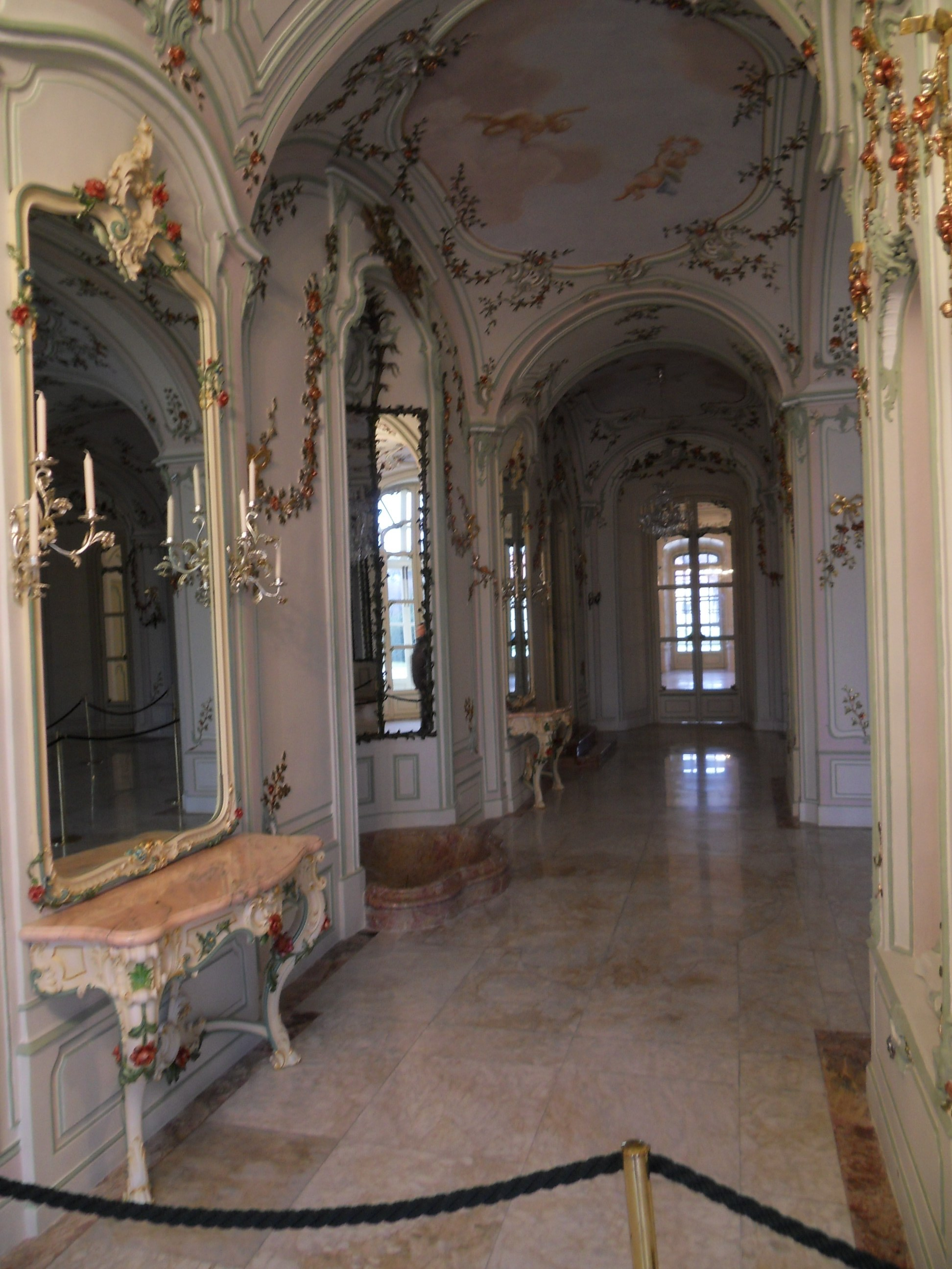 Esterházy-kastély, Fertőd – kastély This is a photo of a monument in Hungary. Identifier: 4051